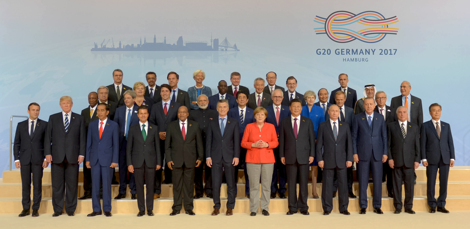 Cumbre de Líderes del G20